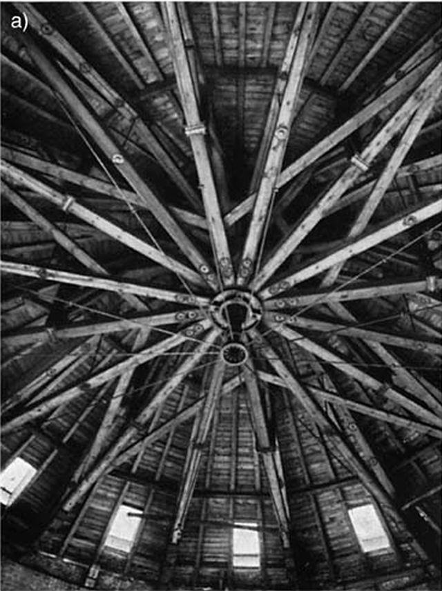 Dachkonstruktionen der Gasbehälter in der Holzmarktstraße in Berlin aus Holz (1838)